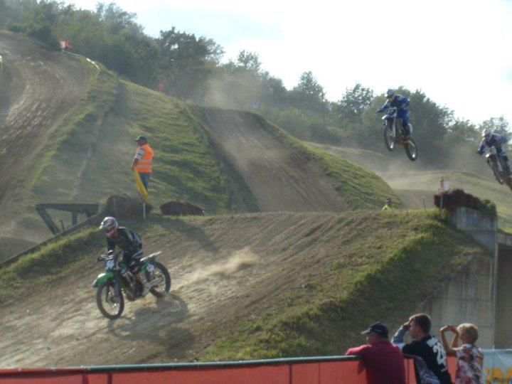 Hrvatsko prvenstvo u motokrosu, utrka se organizirala na Mladini u Jastrebarskom. 10. rujna, 2011.